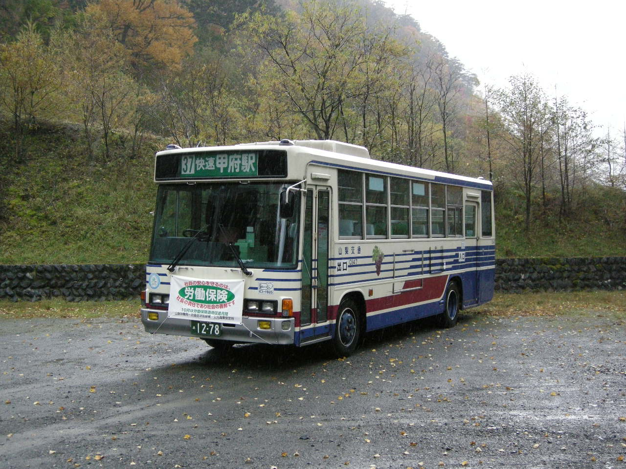 Yamanashi Kotsu Bus Ｃ647 ISUZU P-LR312J